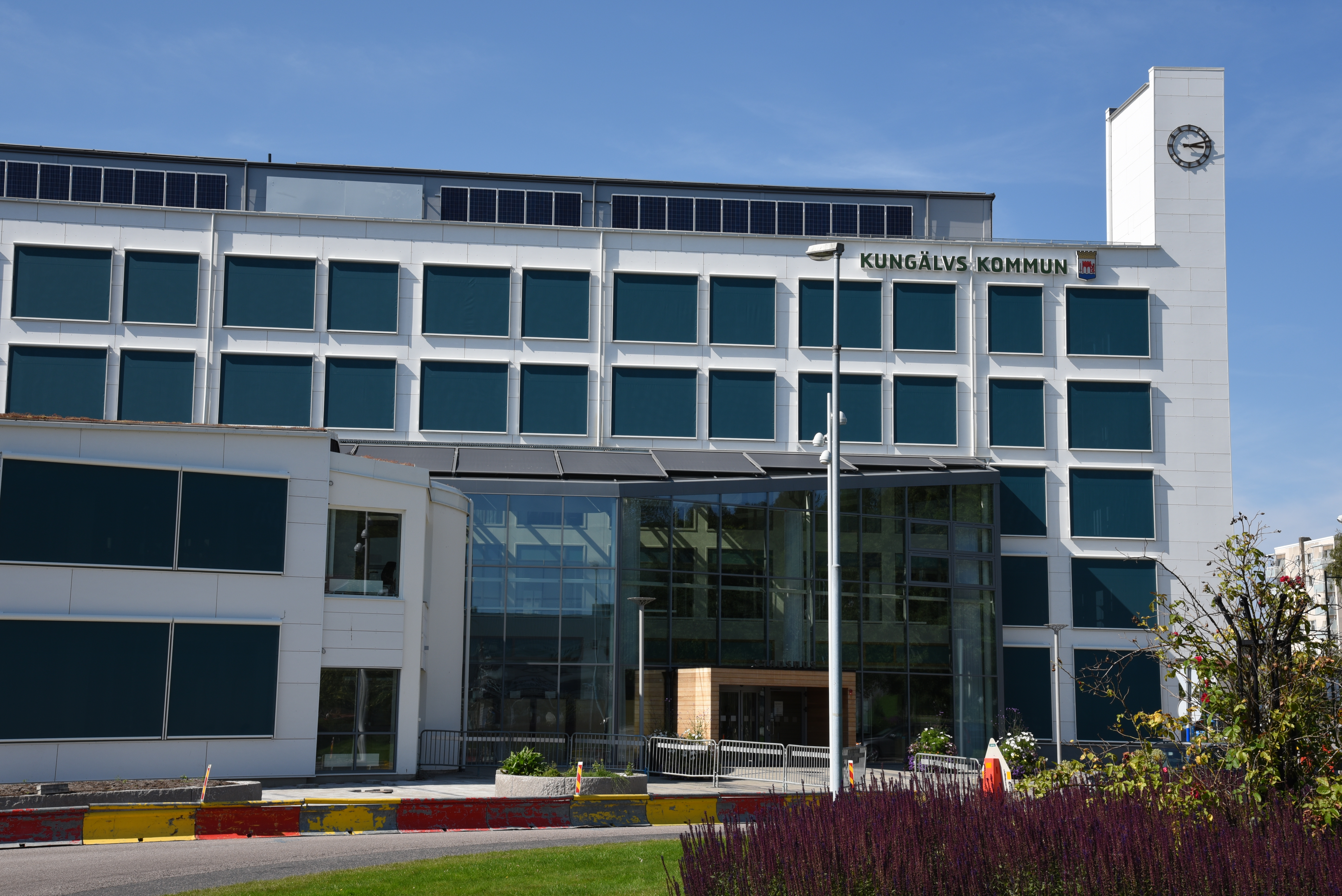 Kungälvs stadshus, tidigare Nämndhuset, efter ombyggnad 2013-2014.